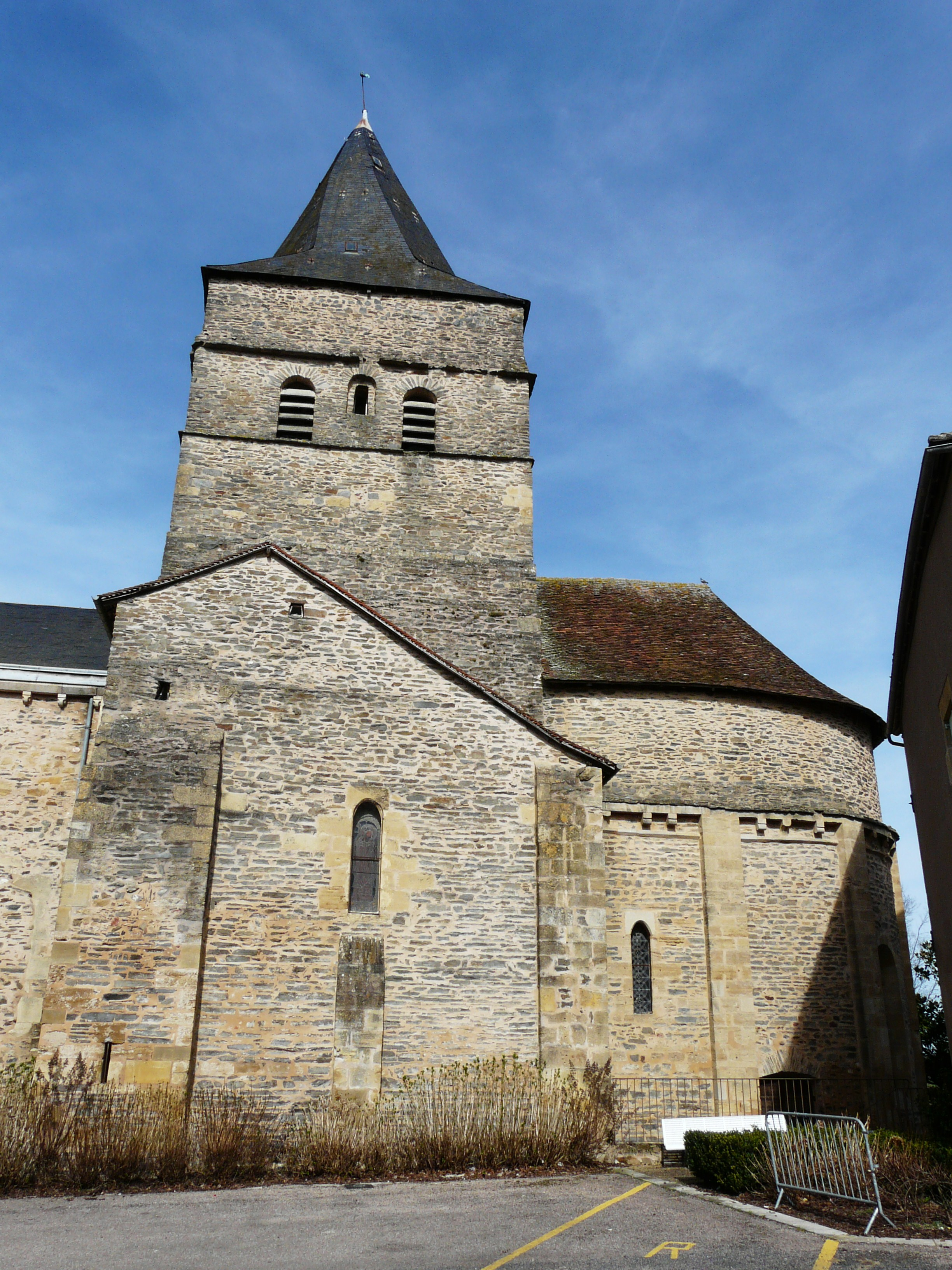 Le clocher et le chevet de l'église de la Transfiguration, Payzac, Dordogne, France Object location 45° 24′ 3.60″ N, 1° 13′ 11.80″ E - OpenStreetMap - Proximityrama (Info)